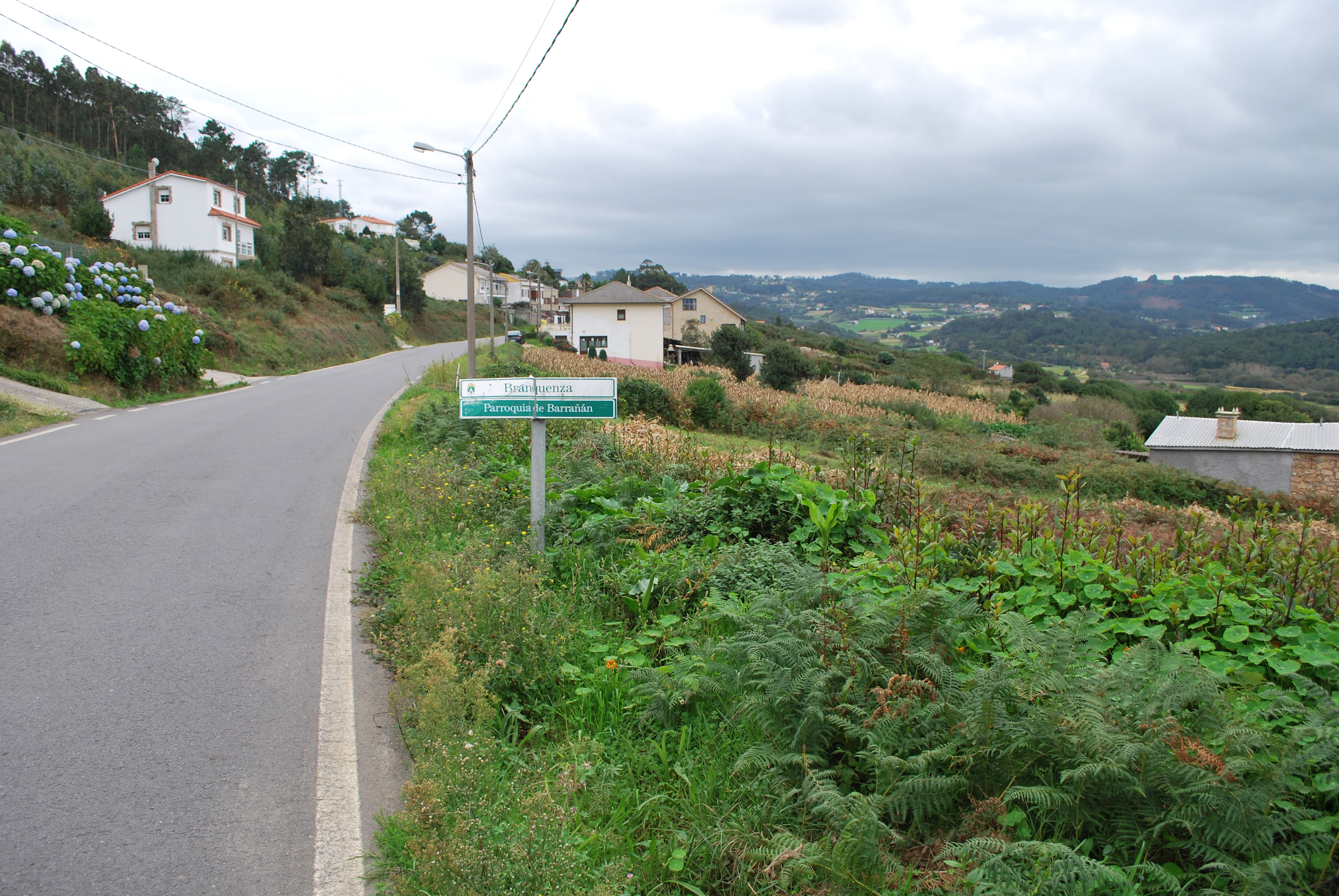 Estrada DP-0506 Branquenza Arteixo A Coruña